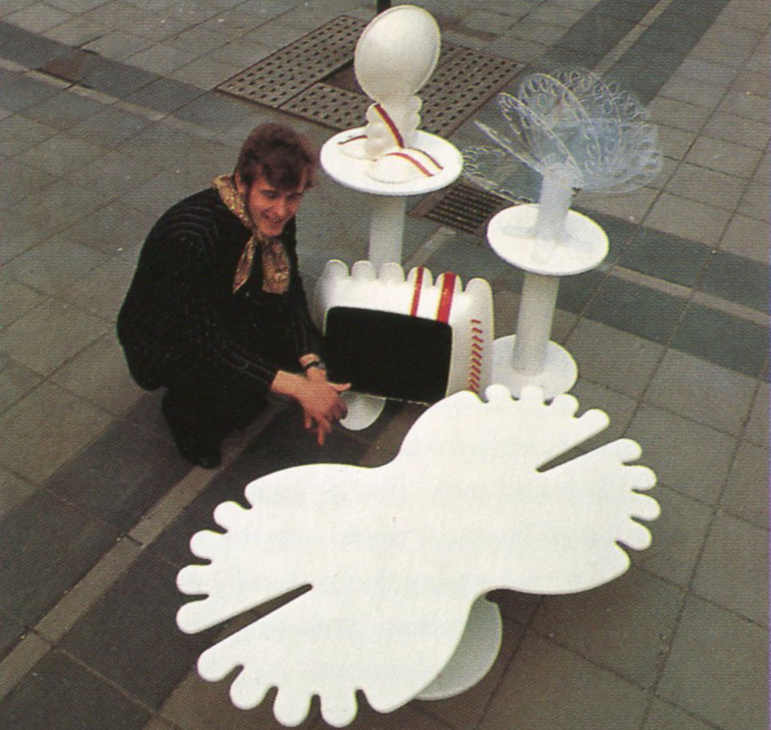 Designer Tom Ahlström med sitt examensarbete 1968